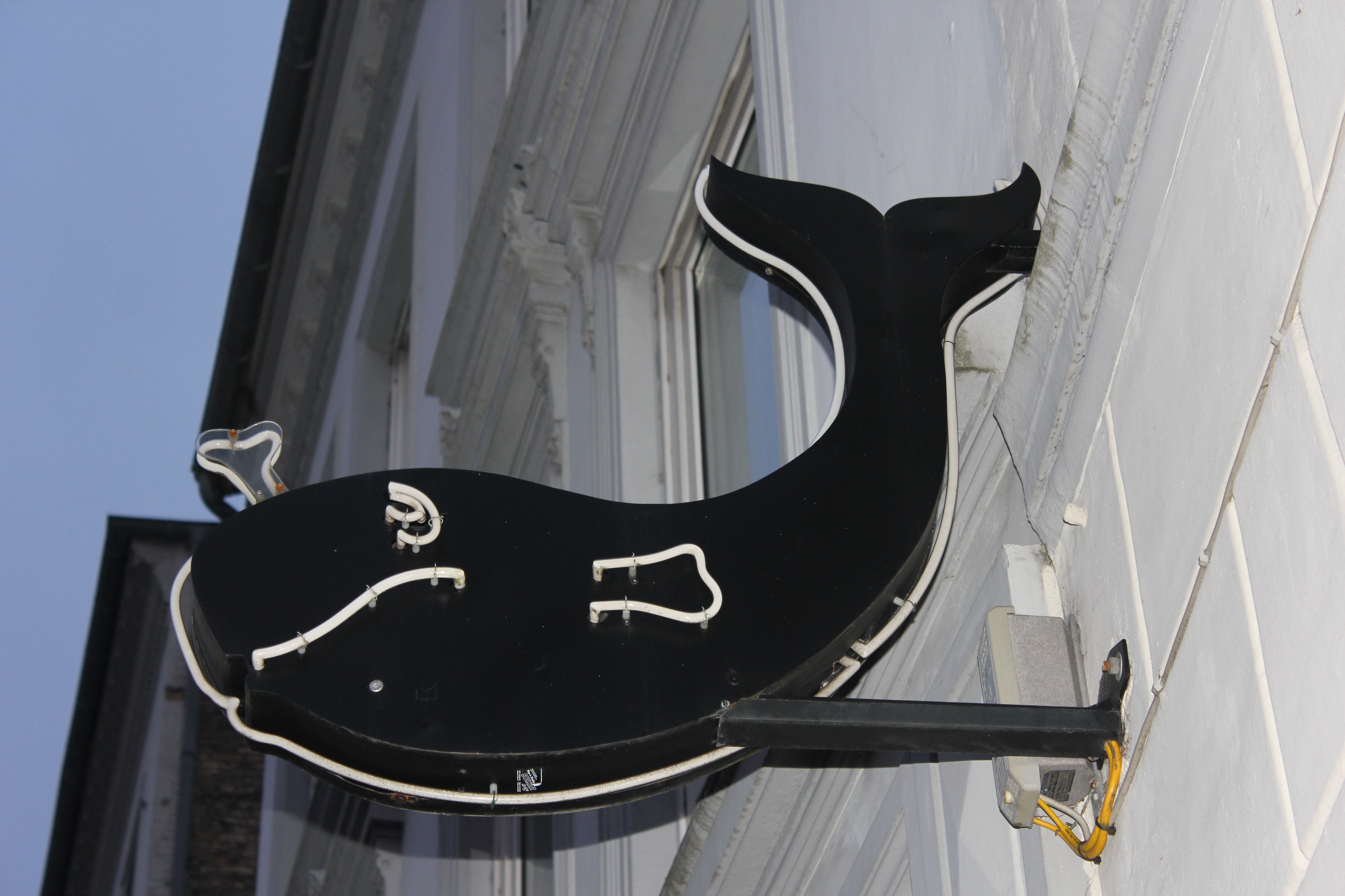 Der schwarze Walfisch am Gasthaus Schwarzer Walfisch, Angelburger Straße 44, Bild 034